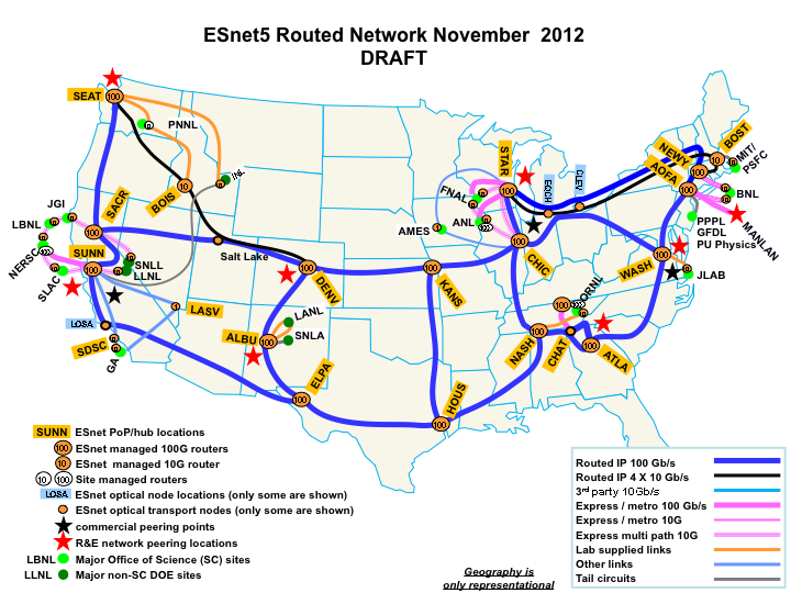 ESnet Map